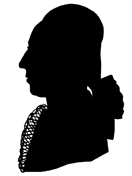 Caspar Friedrich Wolff (1734—1794)